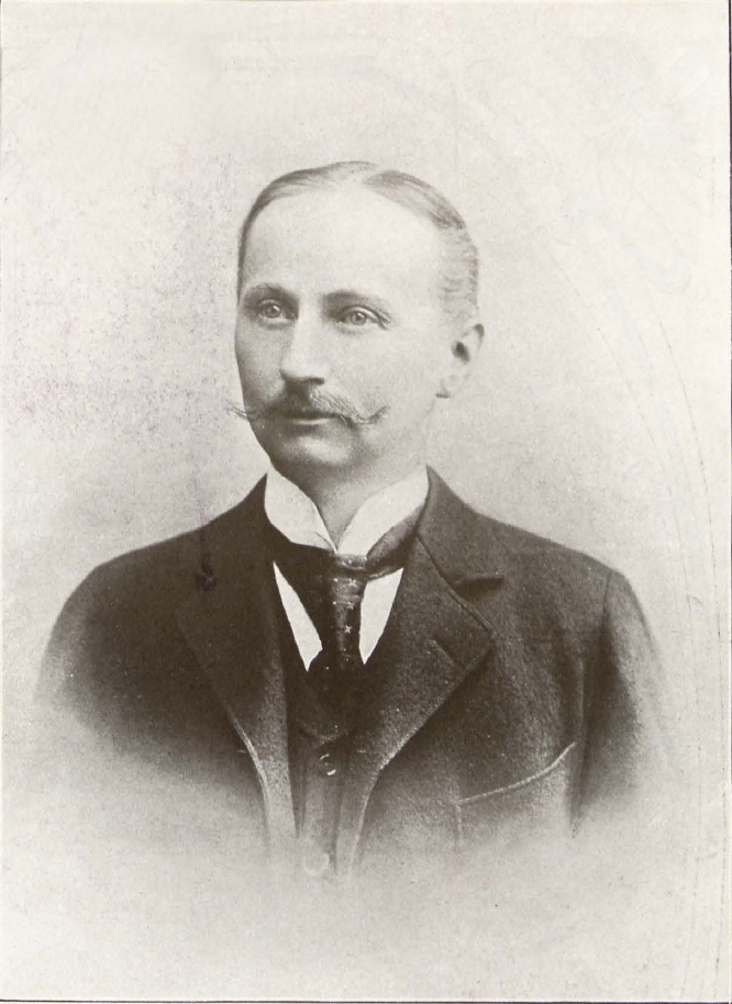 Georg von Borries junior (1857-1922), deutscher Rittergutsbesitzer, Regierungsbeamter, Polizeipräsident von Berlin.